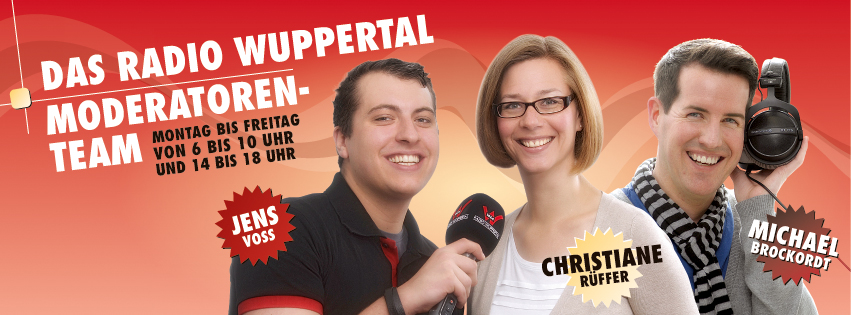 Radio Wuppertal Moderatorenteam